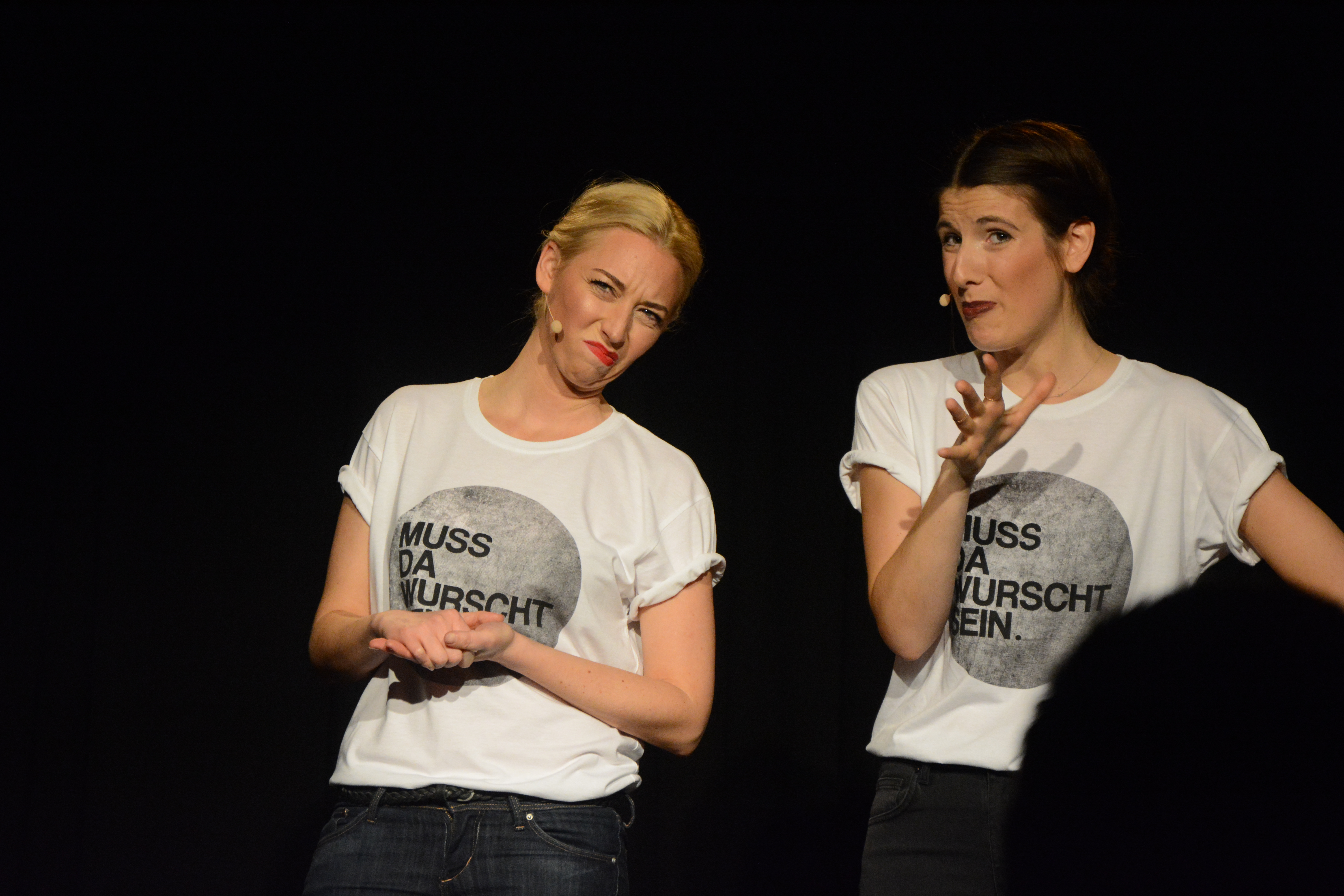 Programm: Muss da wurscht sein ....